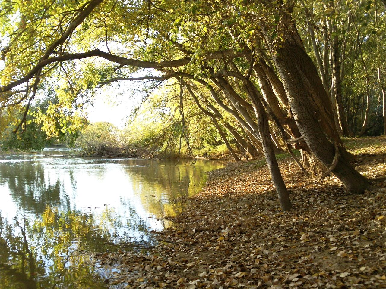 A orillas del Ebro - Parque del agua